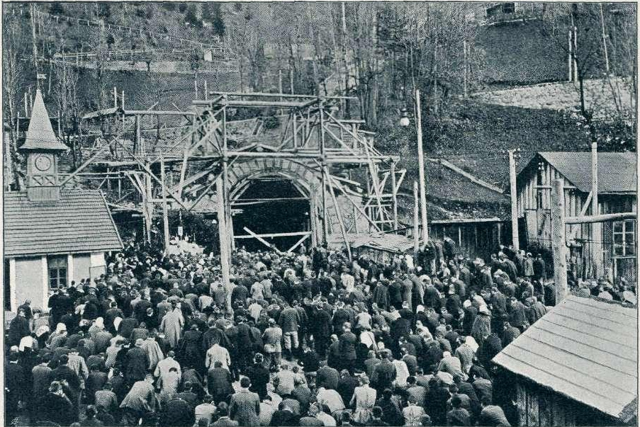 Pred karavanškim predorom na Hrušici - služba božja za ponesrečene delavce.